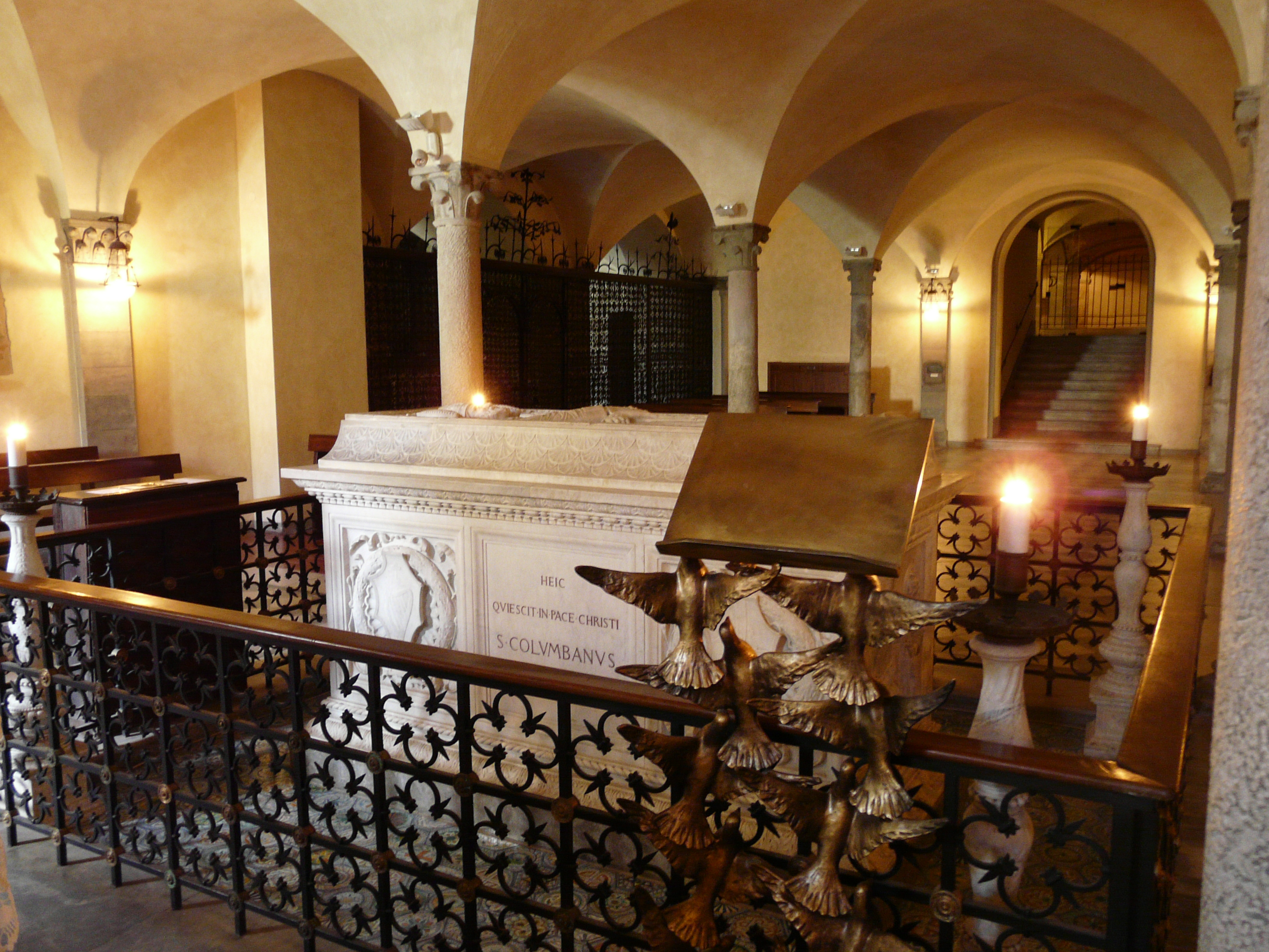 Immagini dell'abbazia di San Colombano di Bobbio, Emilia-Romagna, Italia